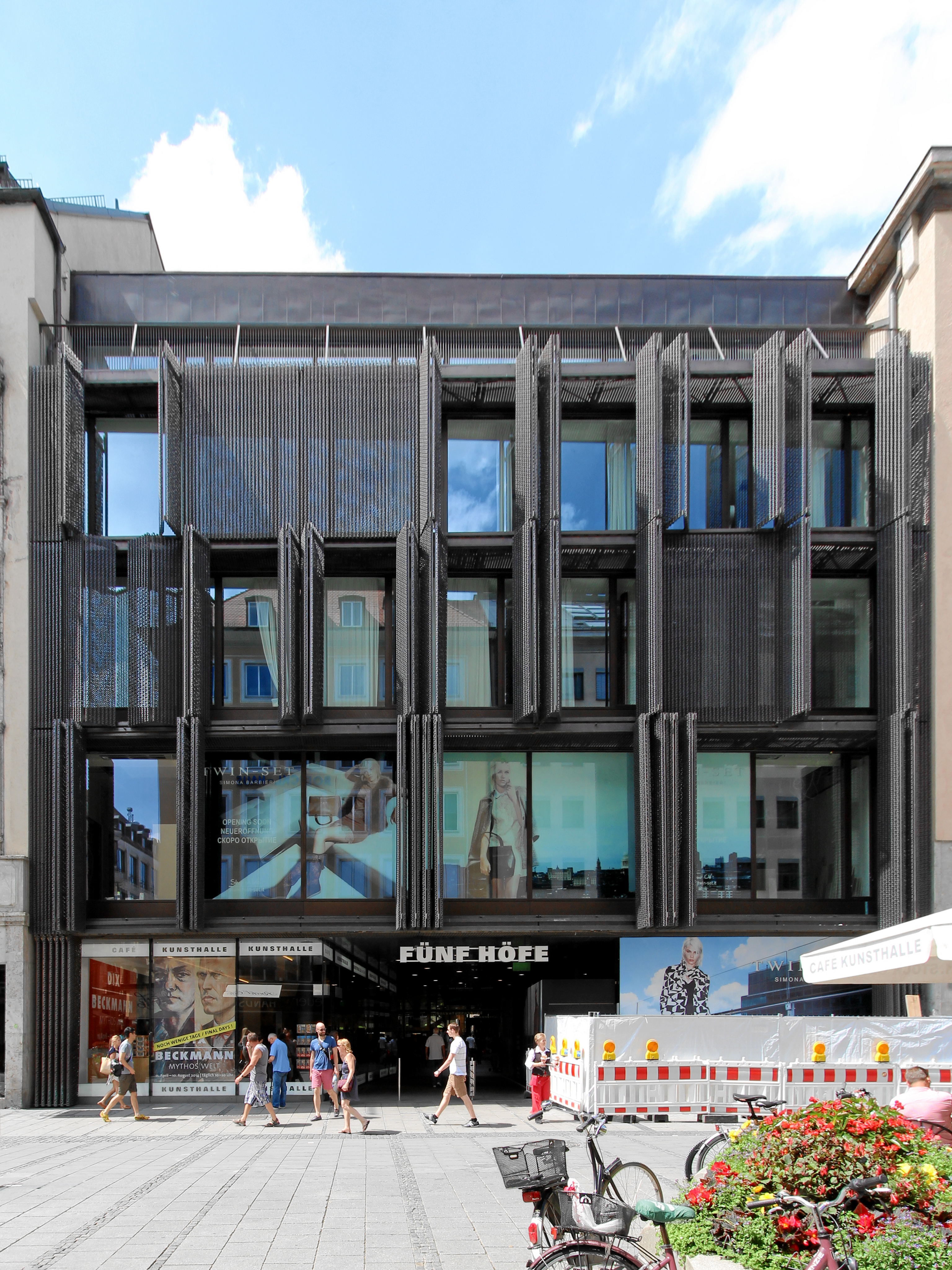 Die Fünf Höfe in der Theatinerstraße 2014